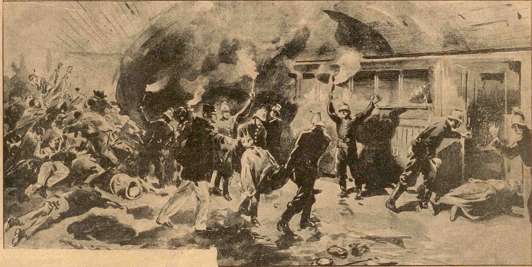 La catastrophe du métro Couronnes, le 10 août 1903, à Paris.